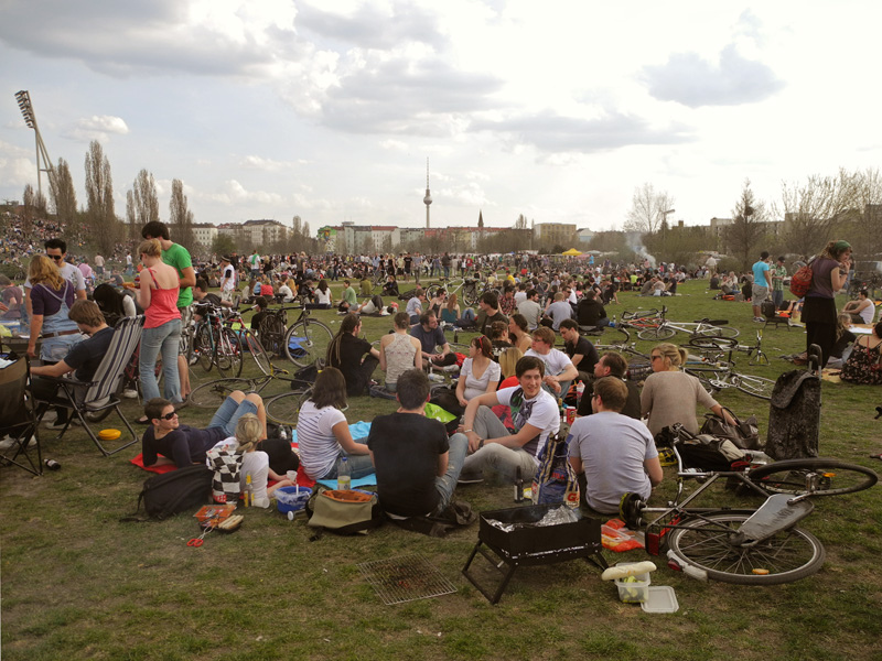 Der Mauerpark an warmen Sommertagen - dicht an dicht drängen sich die Besucher.